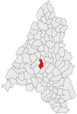 Categorie:Hărţi ale judeţului Bihor